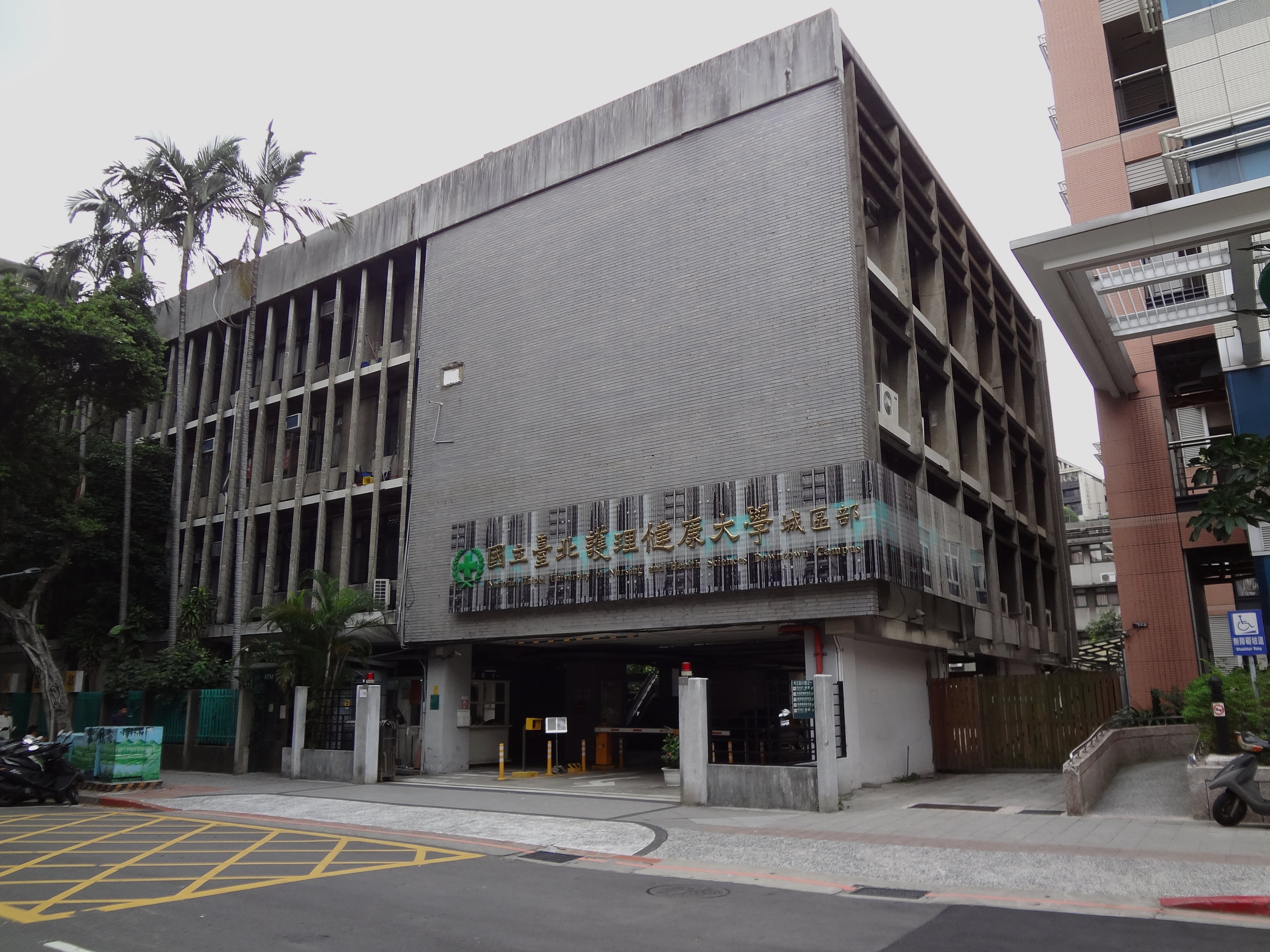 中文（台灣）: 國立臺北護理健康大學城區部，位於臺北市萬華區內江街89號。